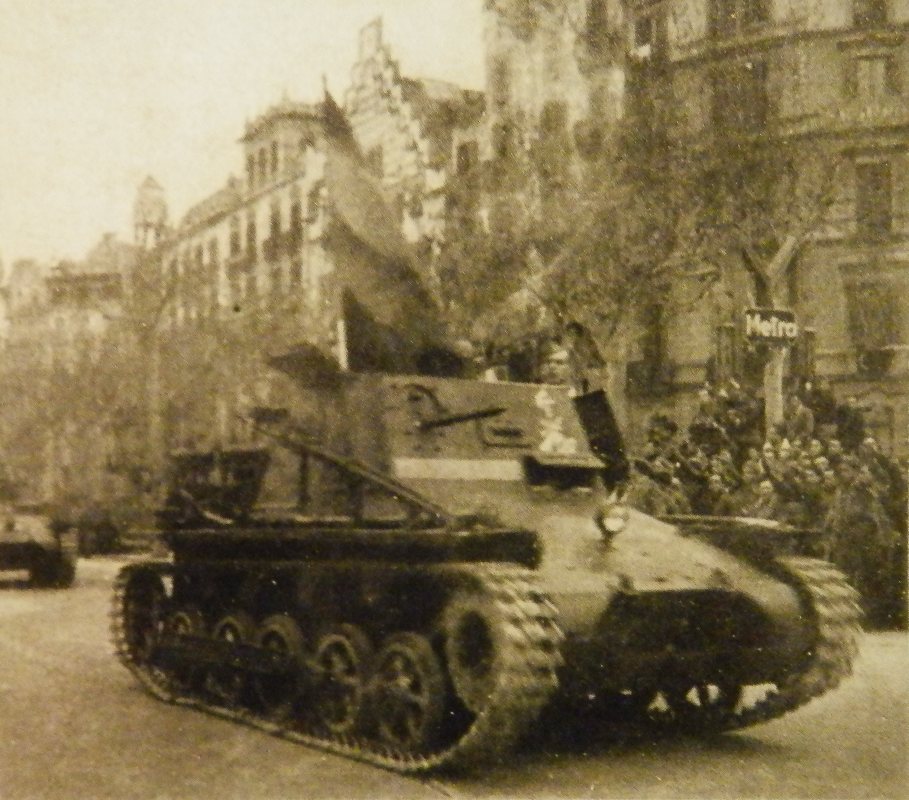 Fotografia de l'exposició "Fu la Spagna!" on es veu un Panzer I de comandament o Panzerbefehlswagen (SdKfz 265) desfilant amb la bandera espanyola per l'illa de la Discòrdia després que Barcelona caigués a mans feixistes.